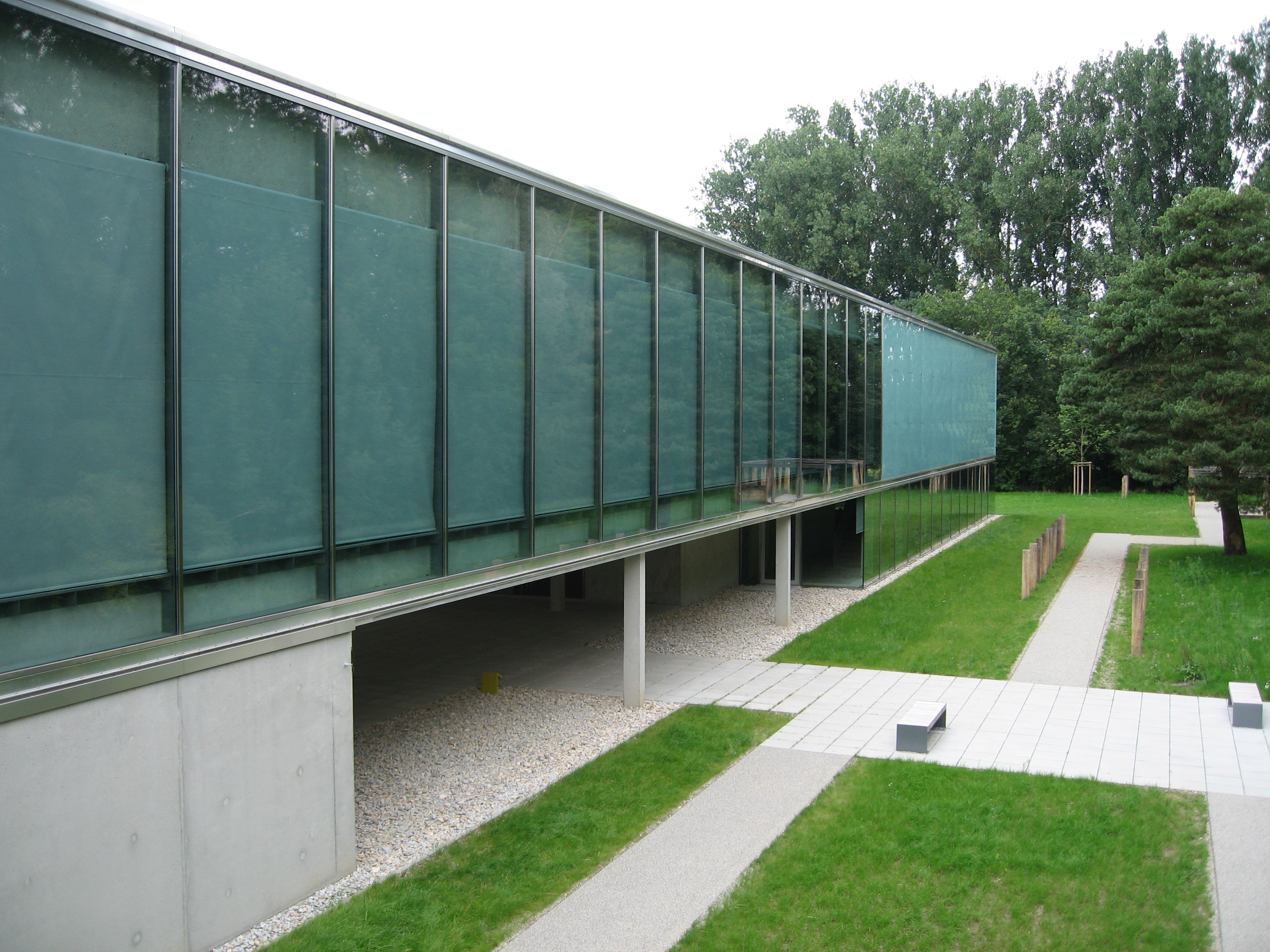 Eingangsbereich des Keltenmuseums in Manching